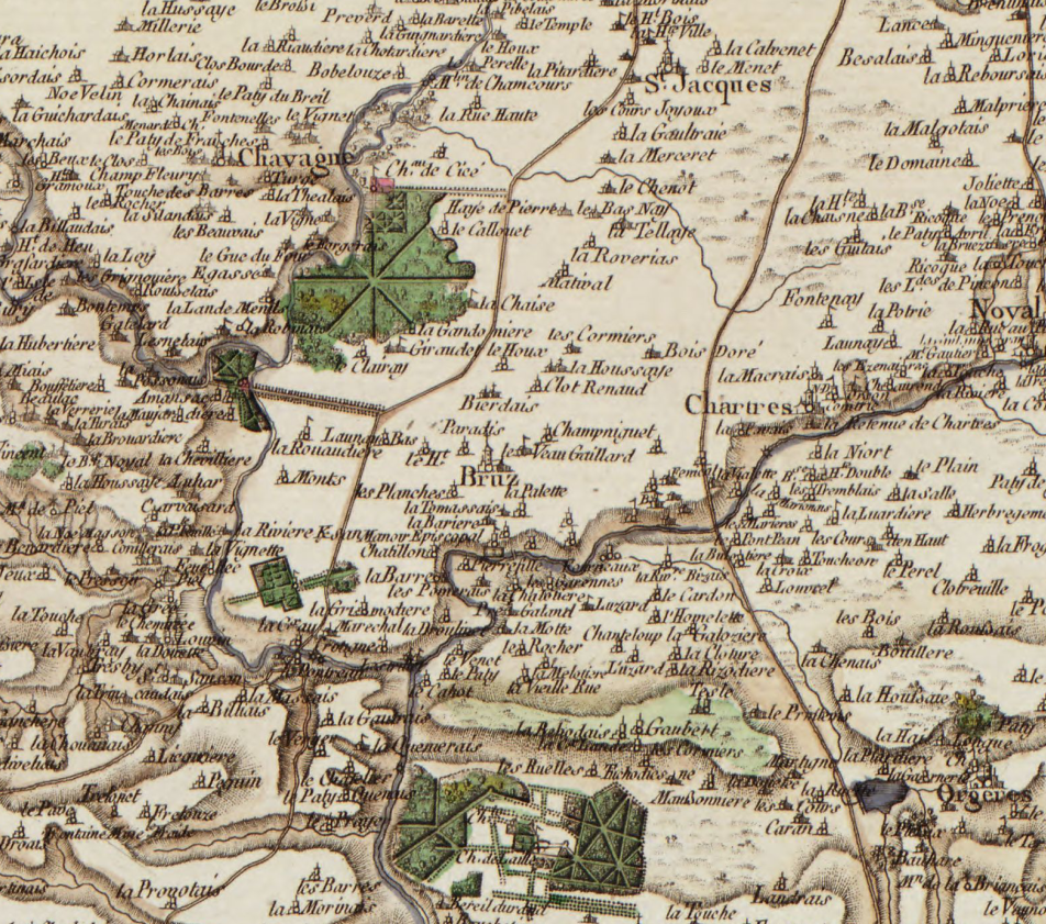 Extrait centré sur Bruz de la carte de Cassini, exemplaire dit de Hauslab-Liechtenstein.